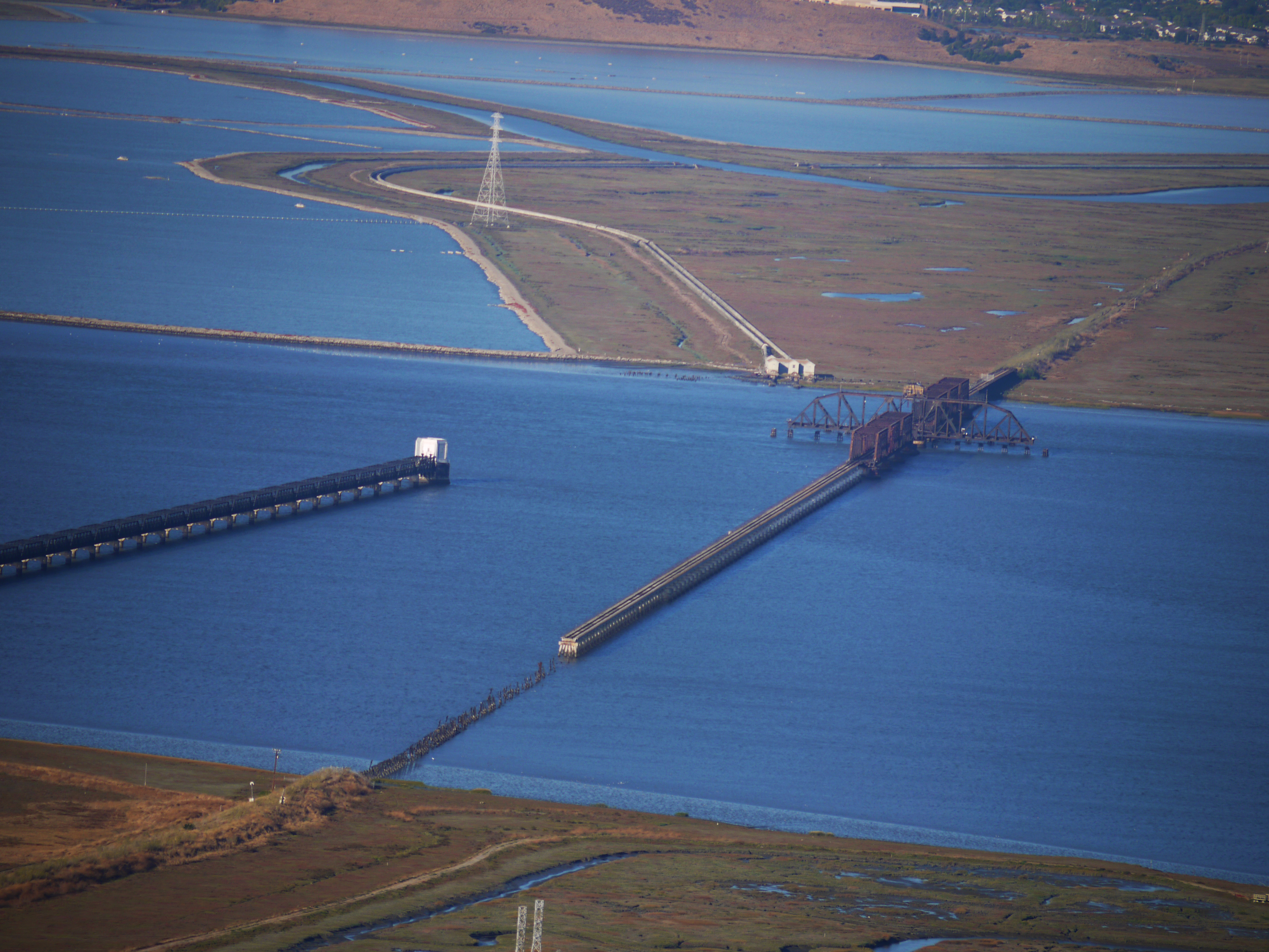 zeppelin-ride-020100925-076